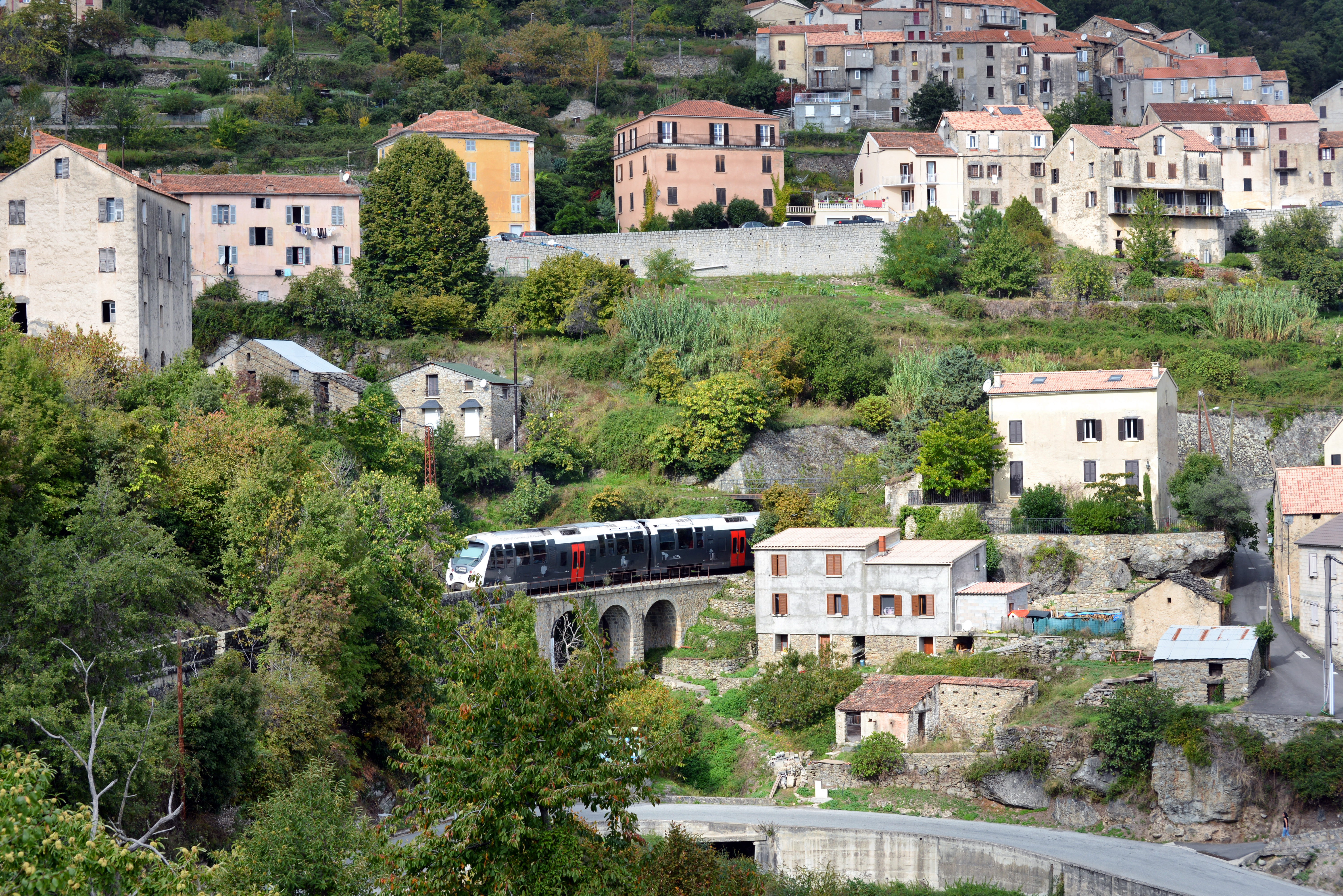 Venaco, Centre Corse - Rame AMG 800 s'apprêtant à franchir le tunnel de Serragio